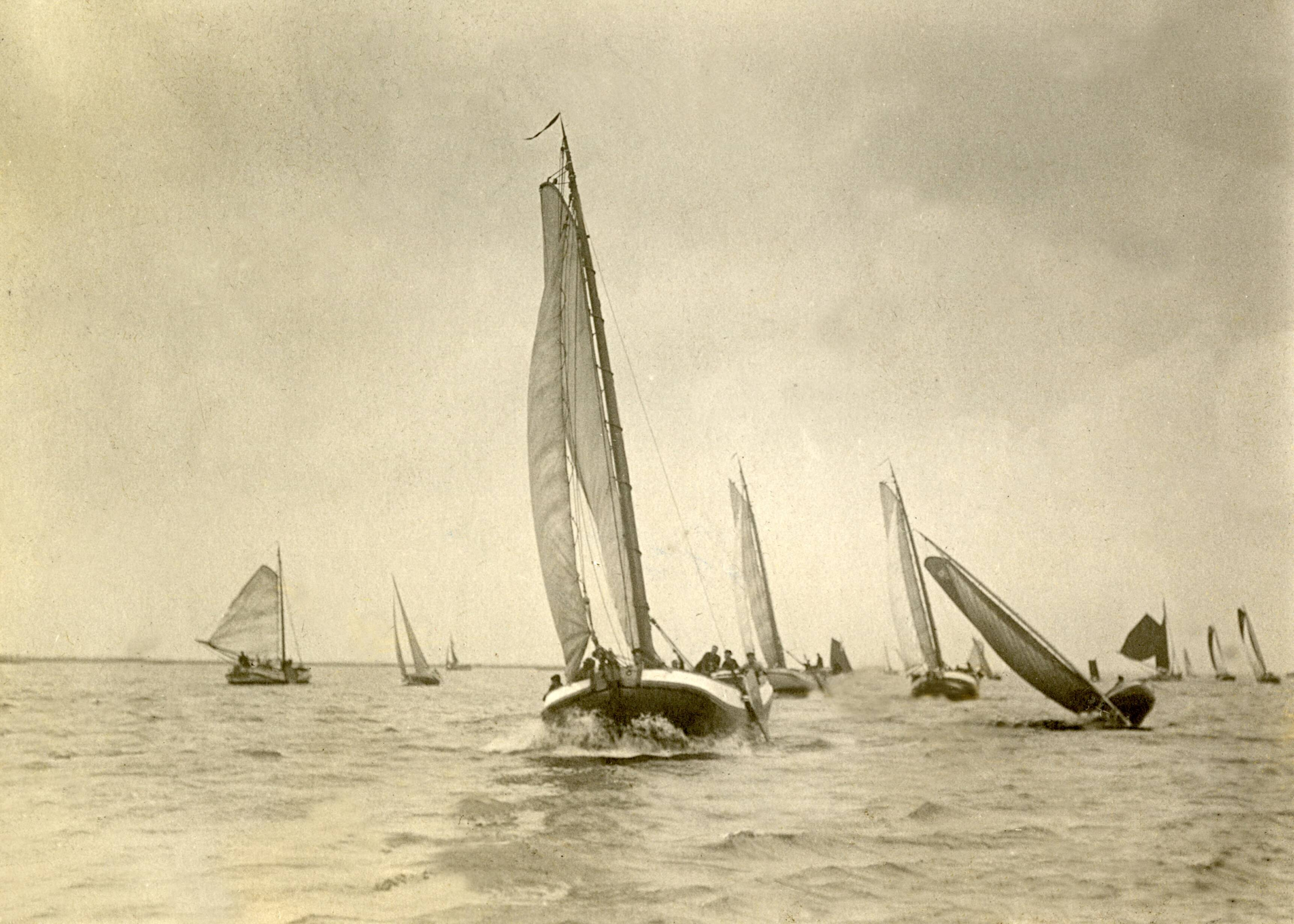 Zeilwedstrijden georganiseerd door zeilvereniging "Sneek" op het Sneekermeer, Nederland, 1909. Foto: Een prachtig gezicht; voorop de "Twee Gebroeders", van E. van de Meer uit Oudega.